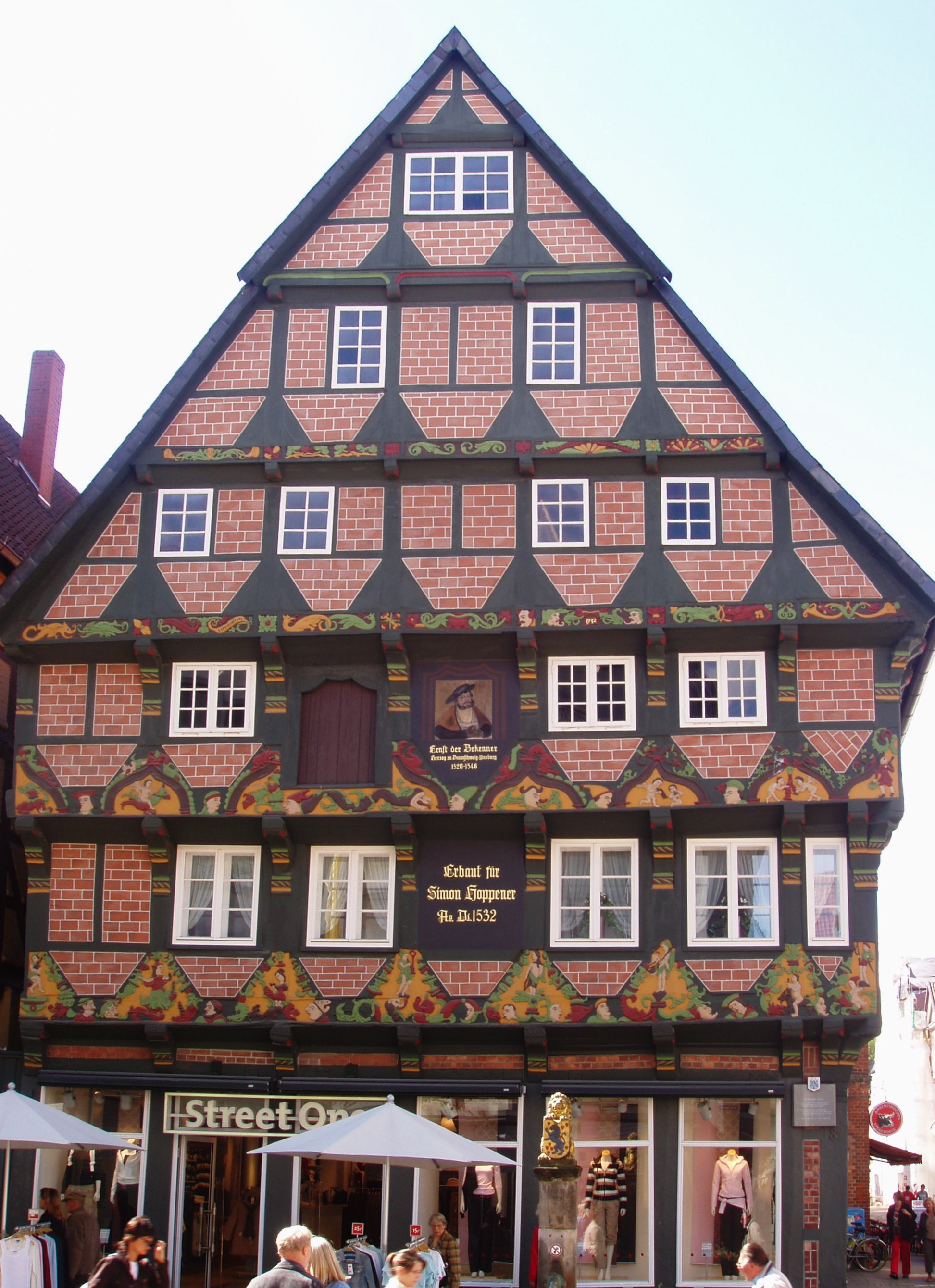 Hoppener Haus, das bekannteste und schönste Fachwerkhaus von Celle